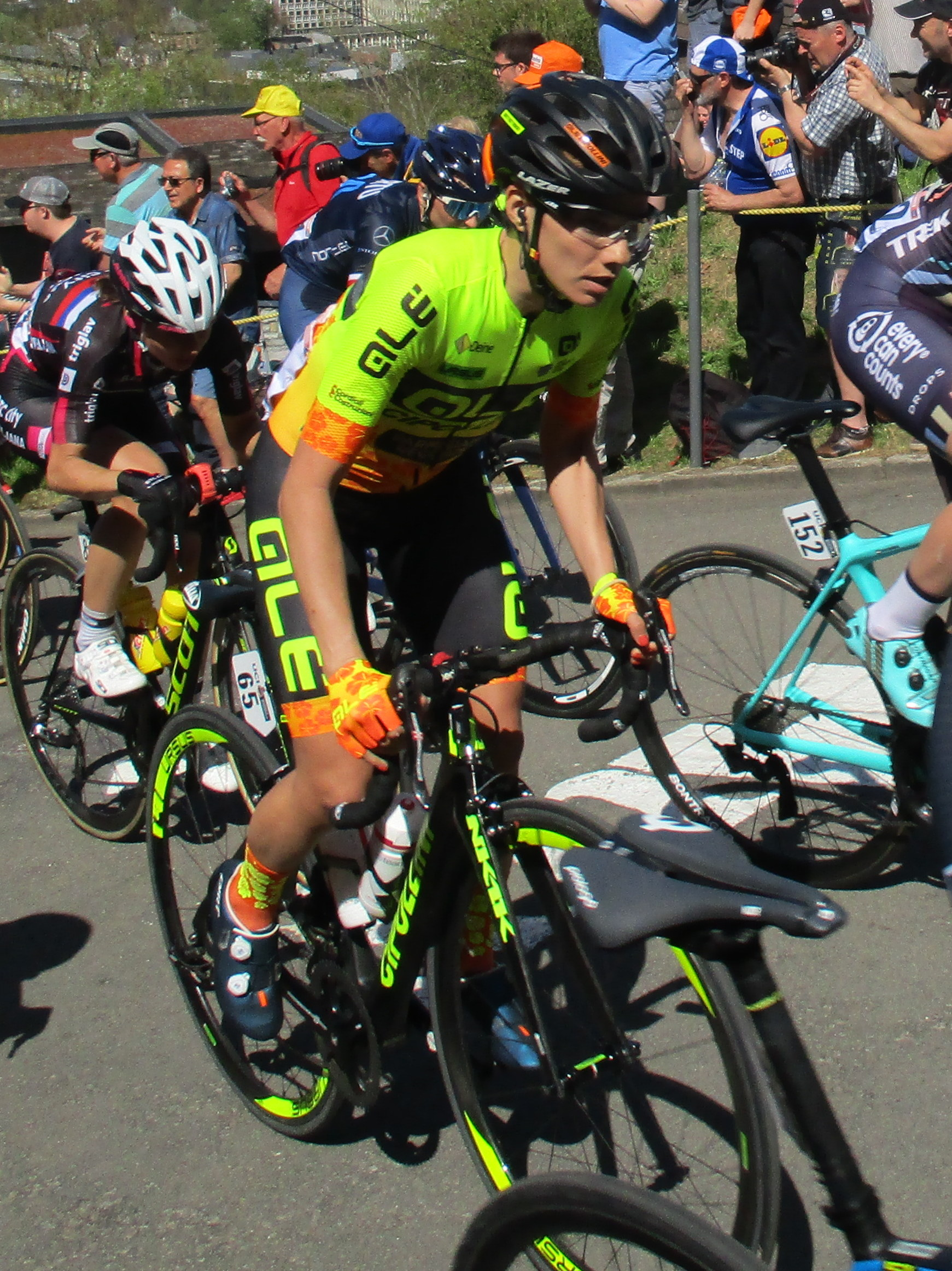 1e passage van de Waalse Pijl 2018 op de Mur van Huy.